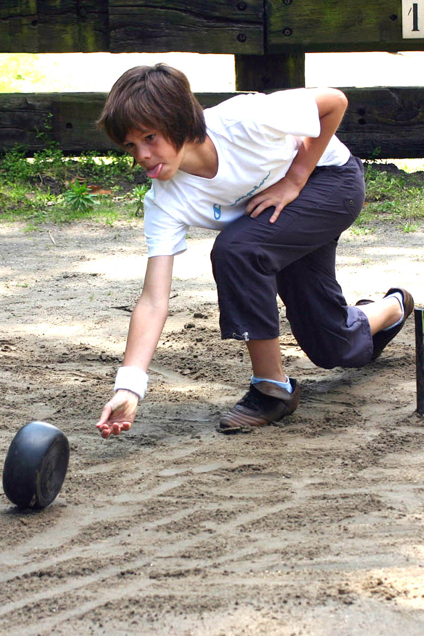 Krulbol